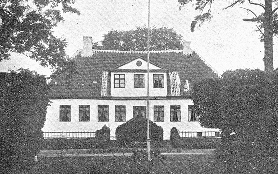 Bramstrup er en gammel Hovedgård, som nævnes første gang i 1424. Gården ligger i Nørre Lyndelse Sogn, Åsum Herred, Årslev Kommune. Hovedbygningen er opført i 1689 og ombygget i 1810.